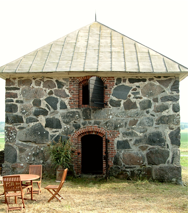 Hirvilahden kartanon vanha kivimakasiini 1700-luvulta